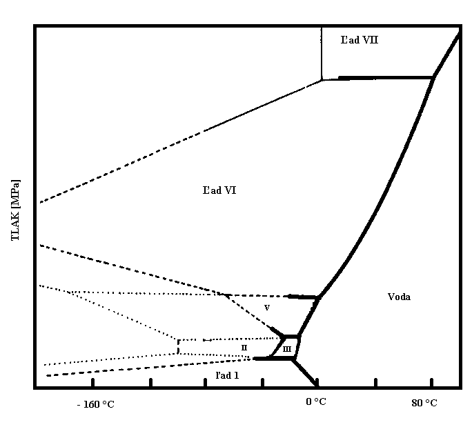 Fázový diagram vody.